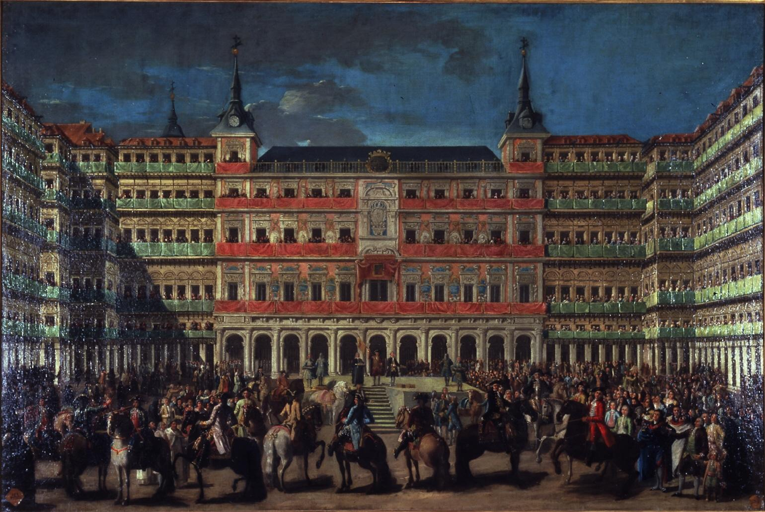 El lienzo representa la proclamación de Carlos III (1716-1788), como rey de España en la Plaza Mayor de Madrid.